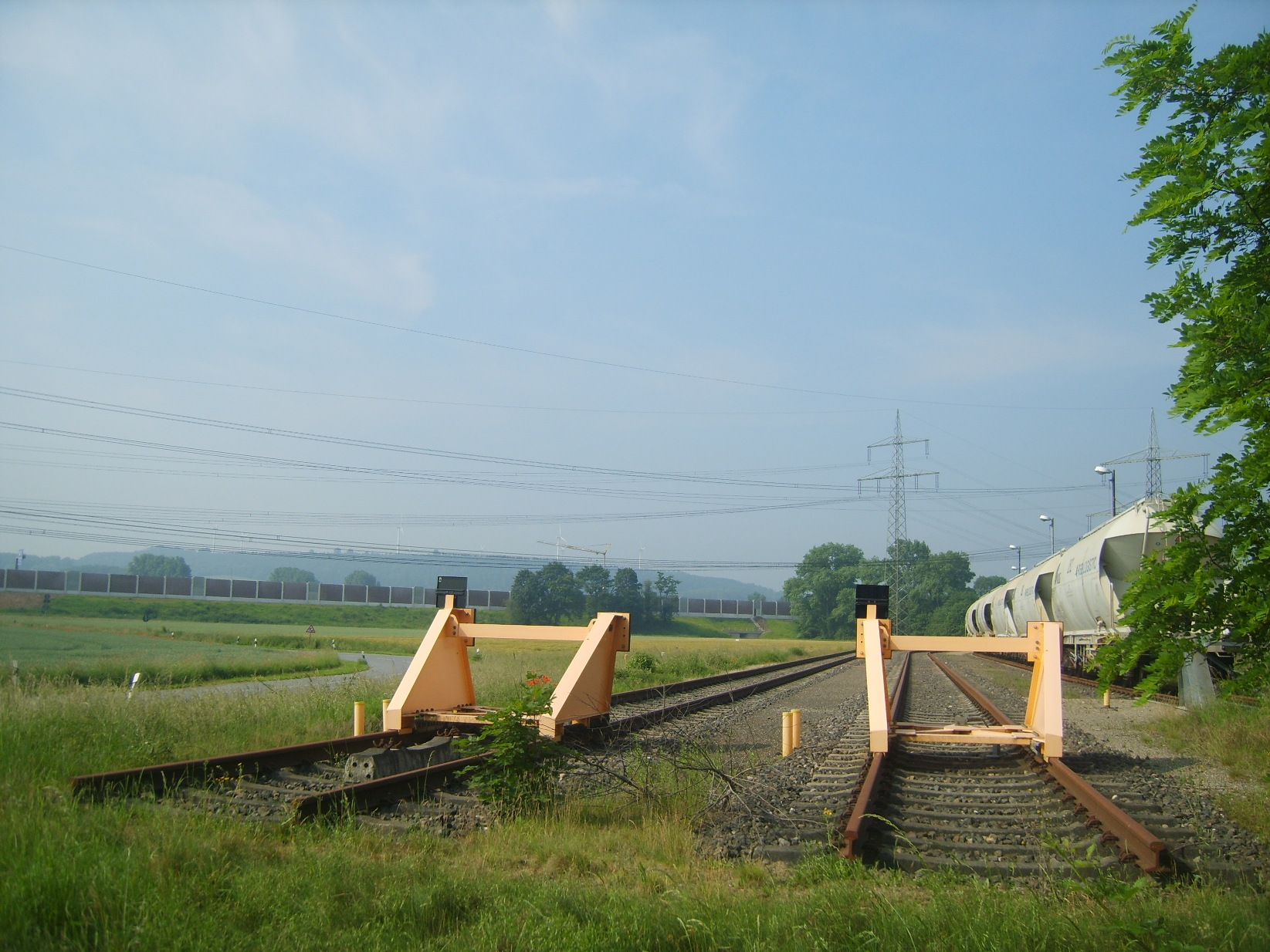 Ende der Talbahnlinie in Inden-Frenz